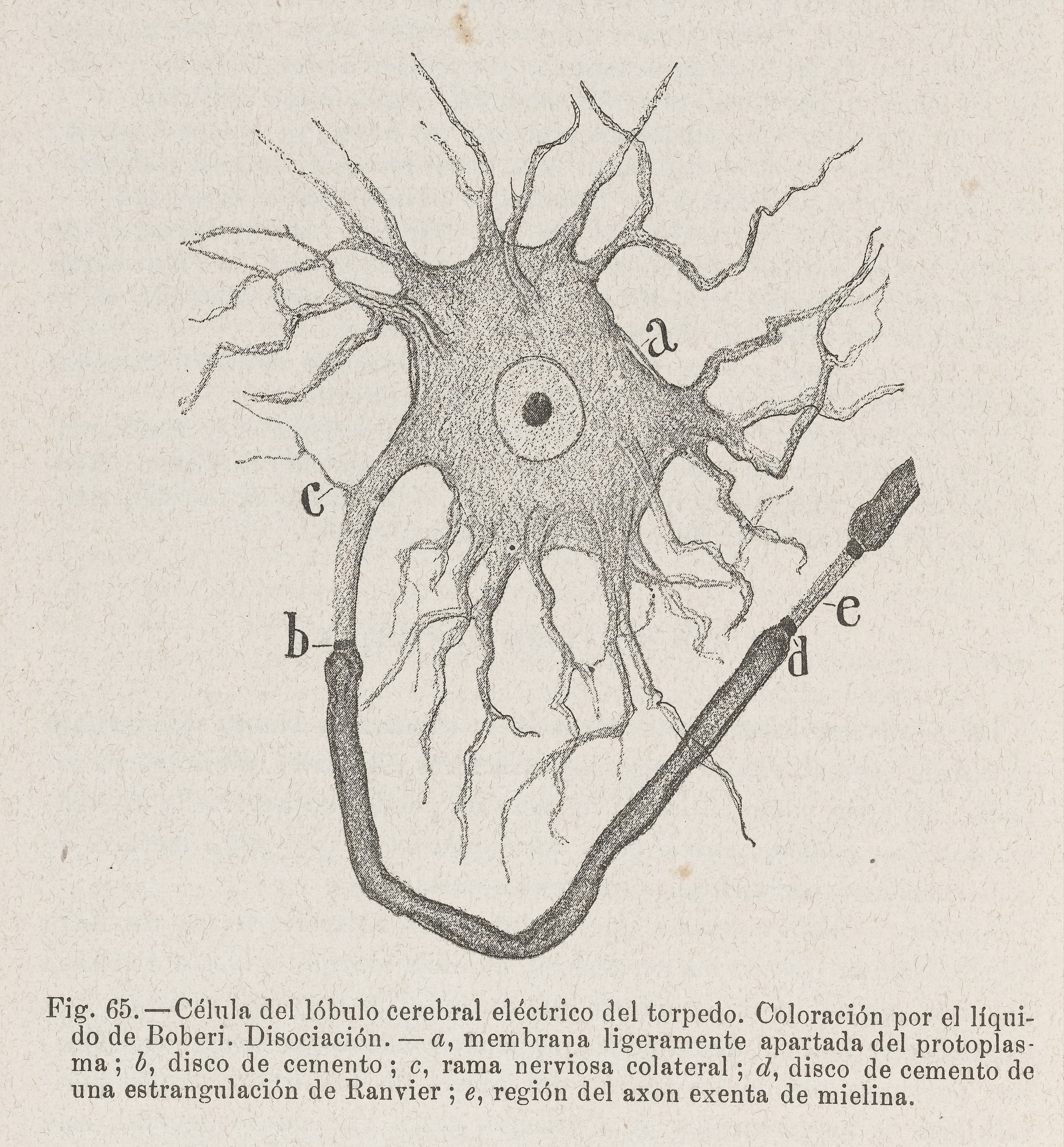 Celula del lobulo cerebral electrico del torpedo. Coloracion por el liquido de boberi. Wellcome Images Keywords: Nerves; Histology; Santiago Ramon y Cajal